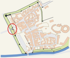 Stadtplan der Büdinger Altstadt - Hervorgehoben das Jerusalemer Tor